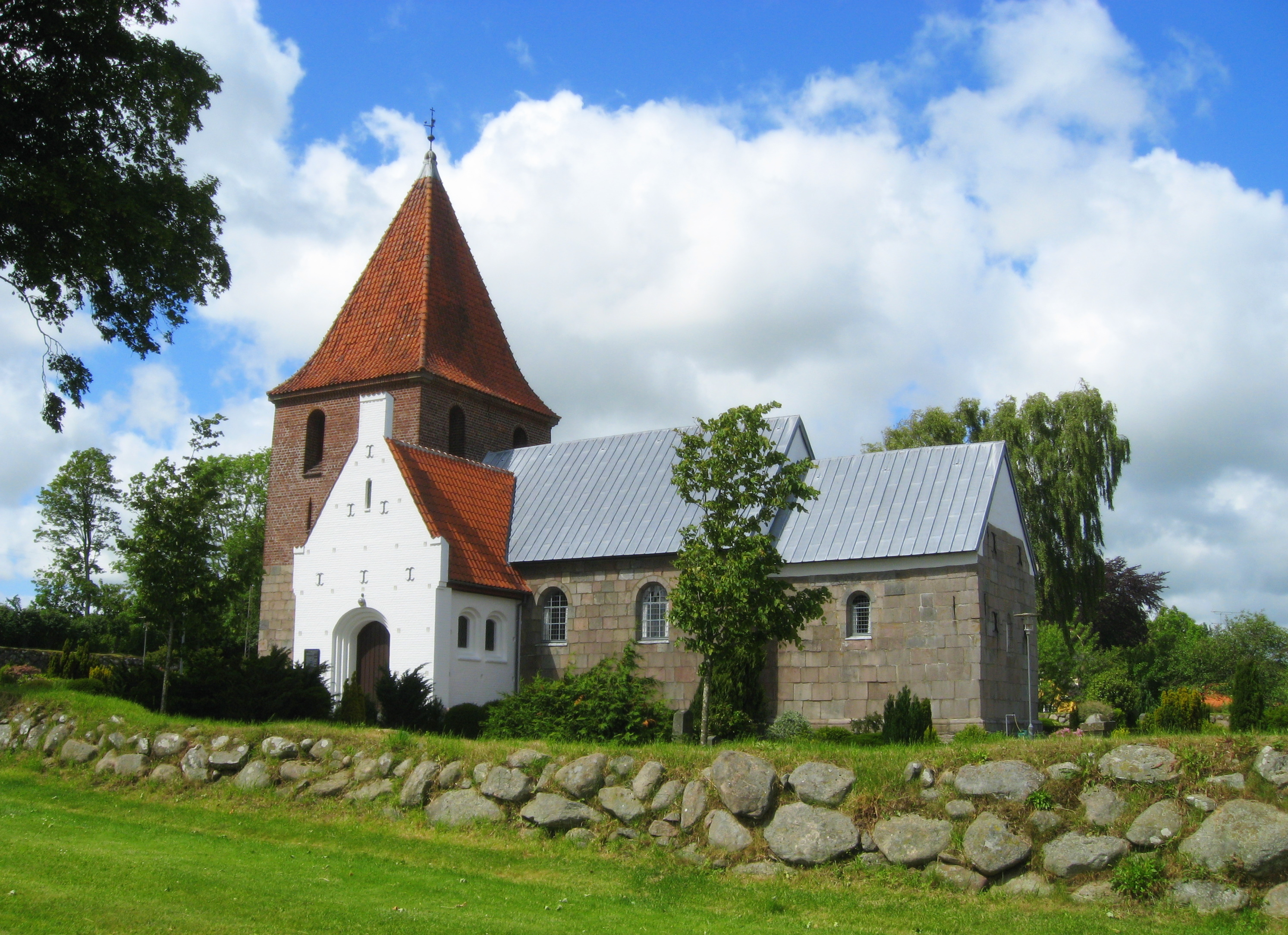 Hallund_Kirke, Brønderslev Kommune